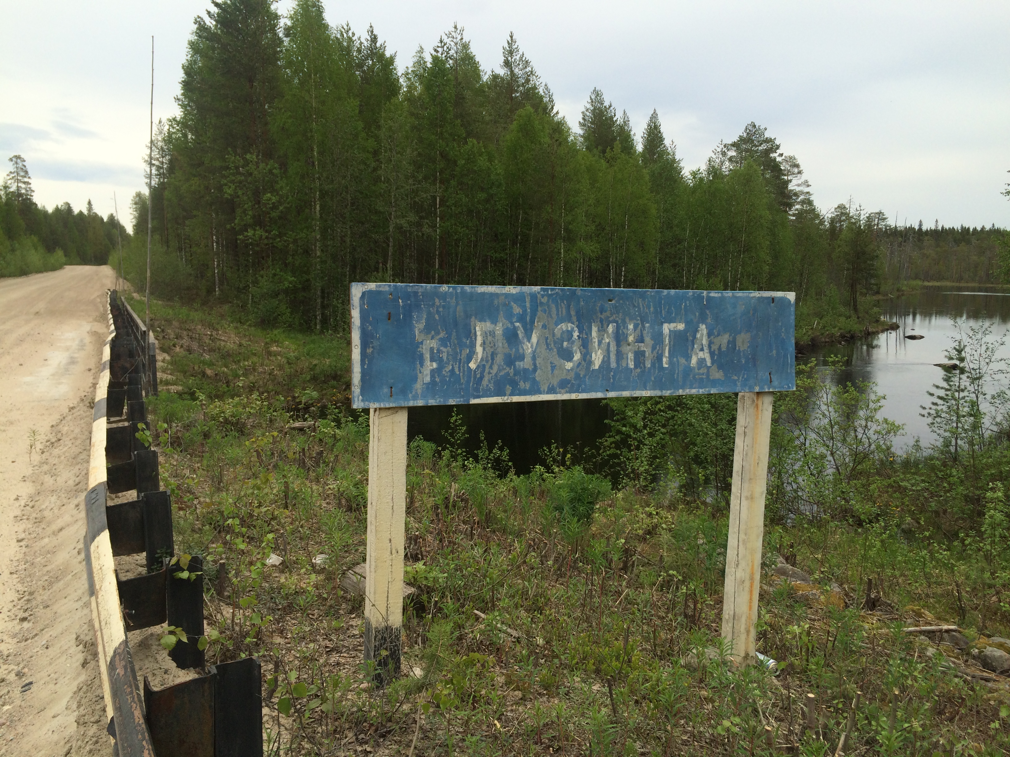 Лузингилакши